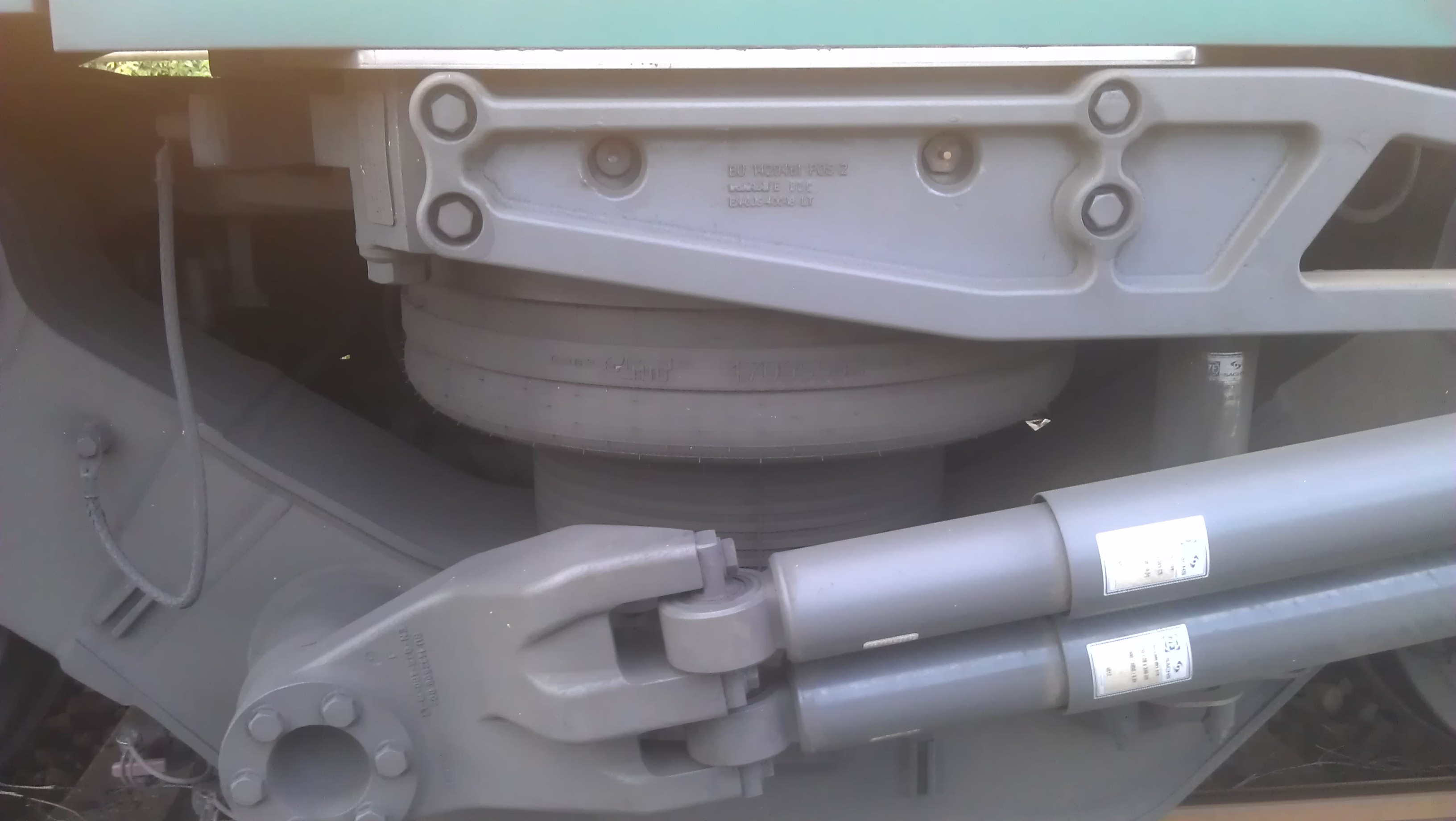 Luftfederung eines Stadler Kiss